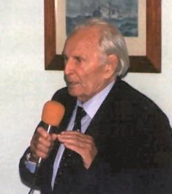 Raimondo Bucher nel 2002 durante una conferenza a Parma